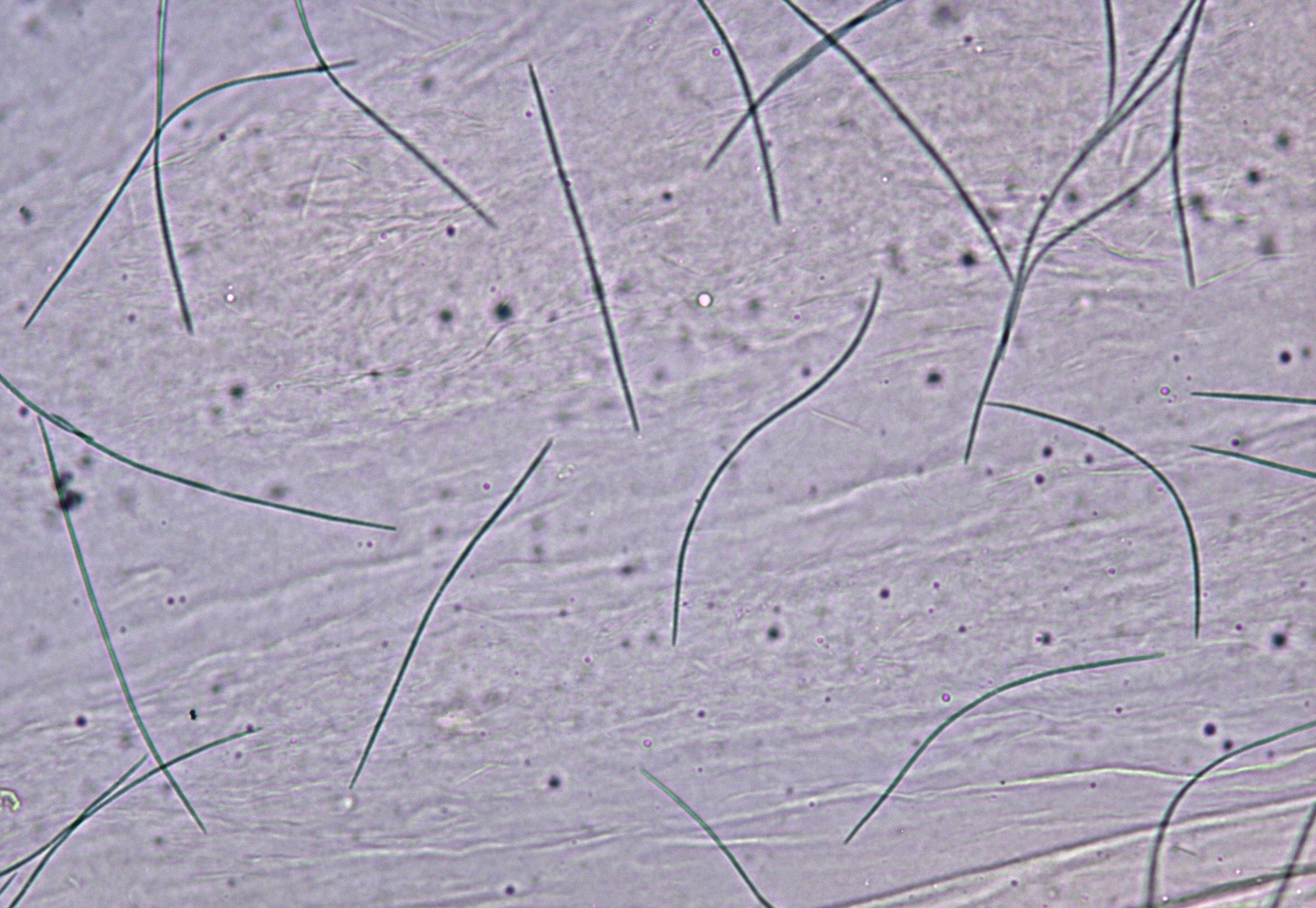 Ascospores de Claviceps purpurea